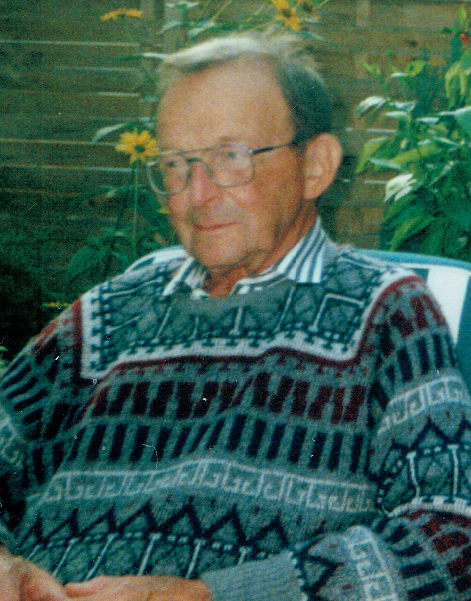 Hans Ludwig Schoenthal (1923-2002), deutscher Politiker (SPD), Mitglied des Abgeordnetenhauses von Berlin, Foto: 2000